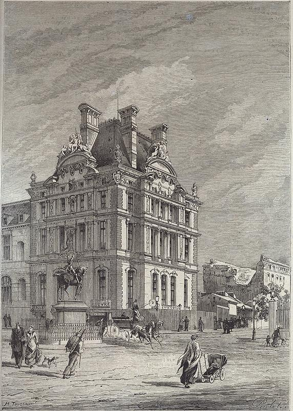 Louvre Pavillon de Flore 1875-1878